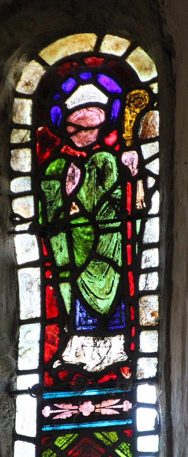 Coulandon (03) église St Martin Vitrail de St Martin XIIème